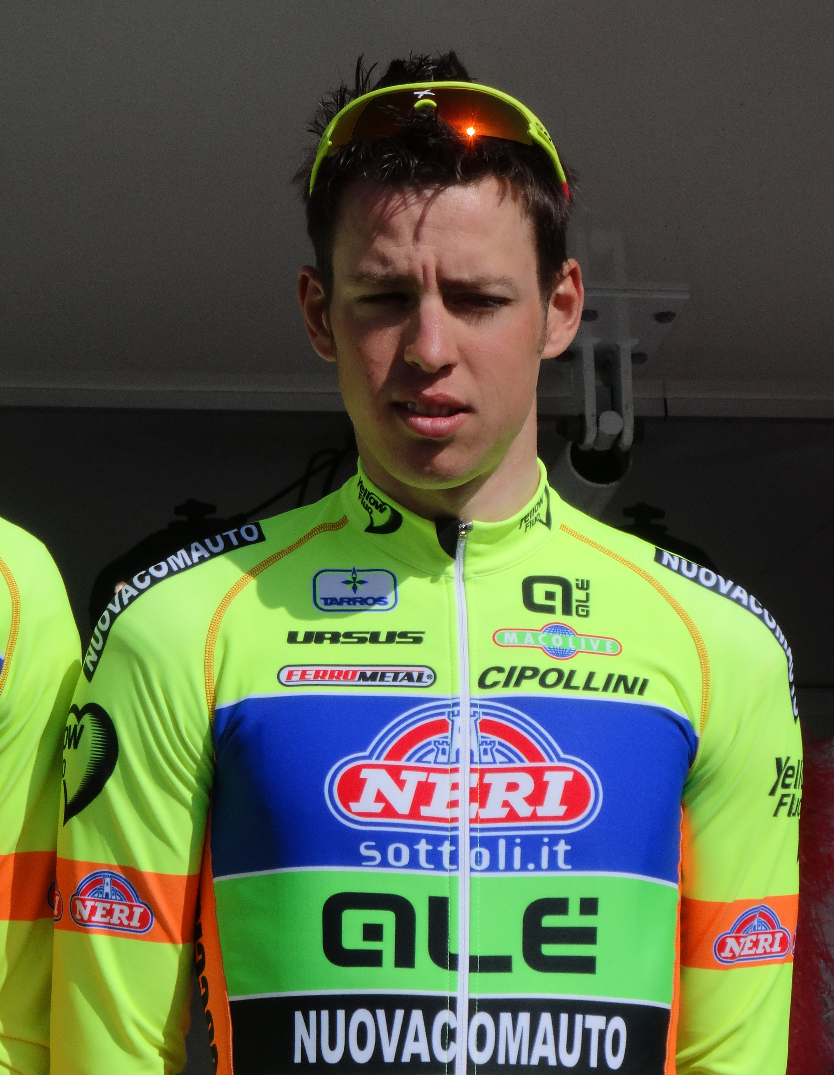 Reportage réalisé le jeudi 17 avril à l'occasion du départ et de l'arrivée du Grand Prix de Denain 2014 à Denain, Nord, Nord-Pas-de-Calais, France.